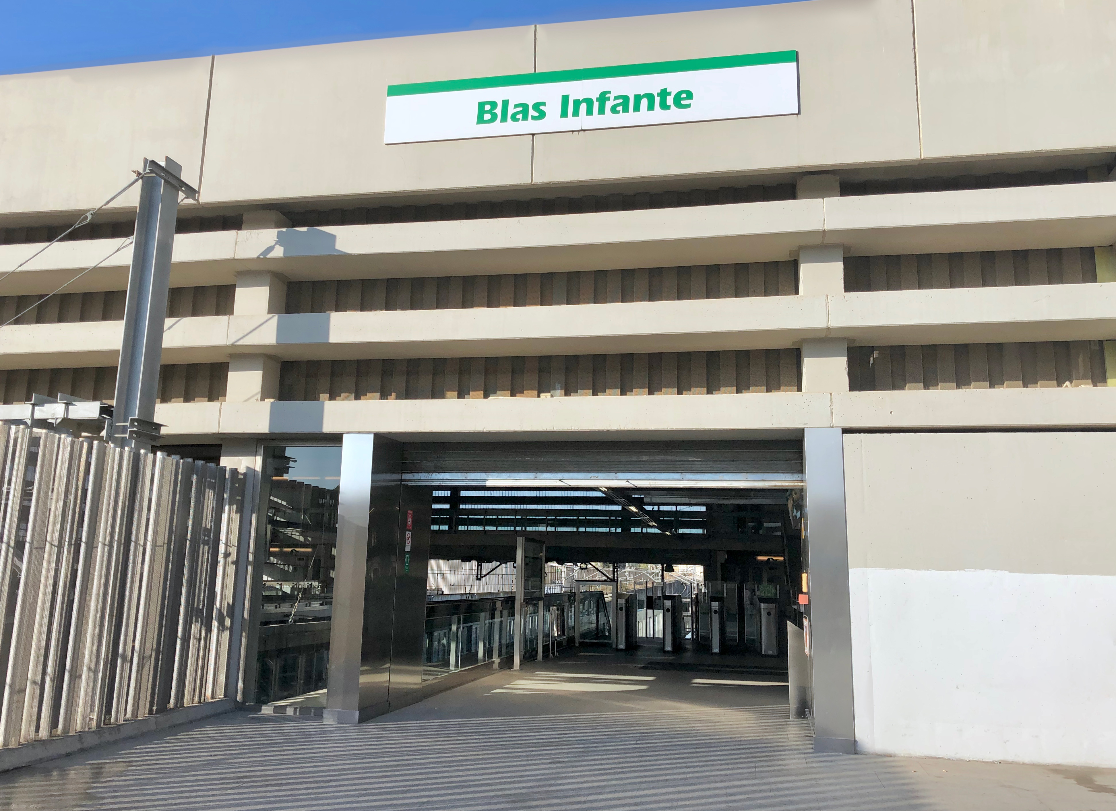 Entrada de la estación Blas Infante del Metro de Sevilla